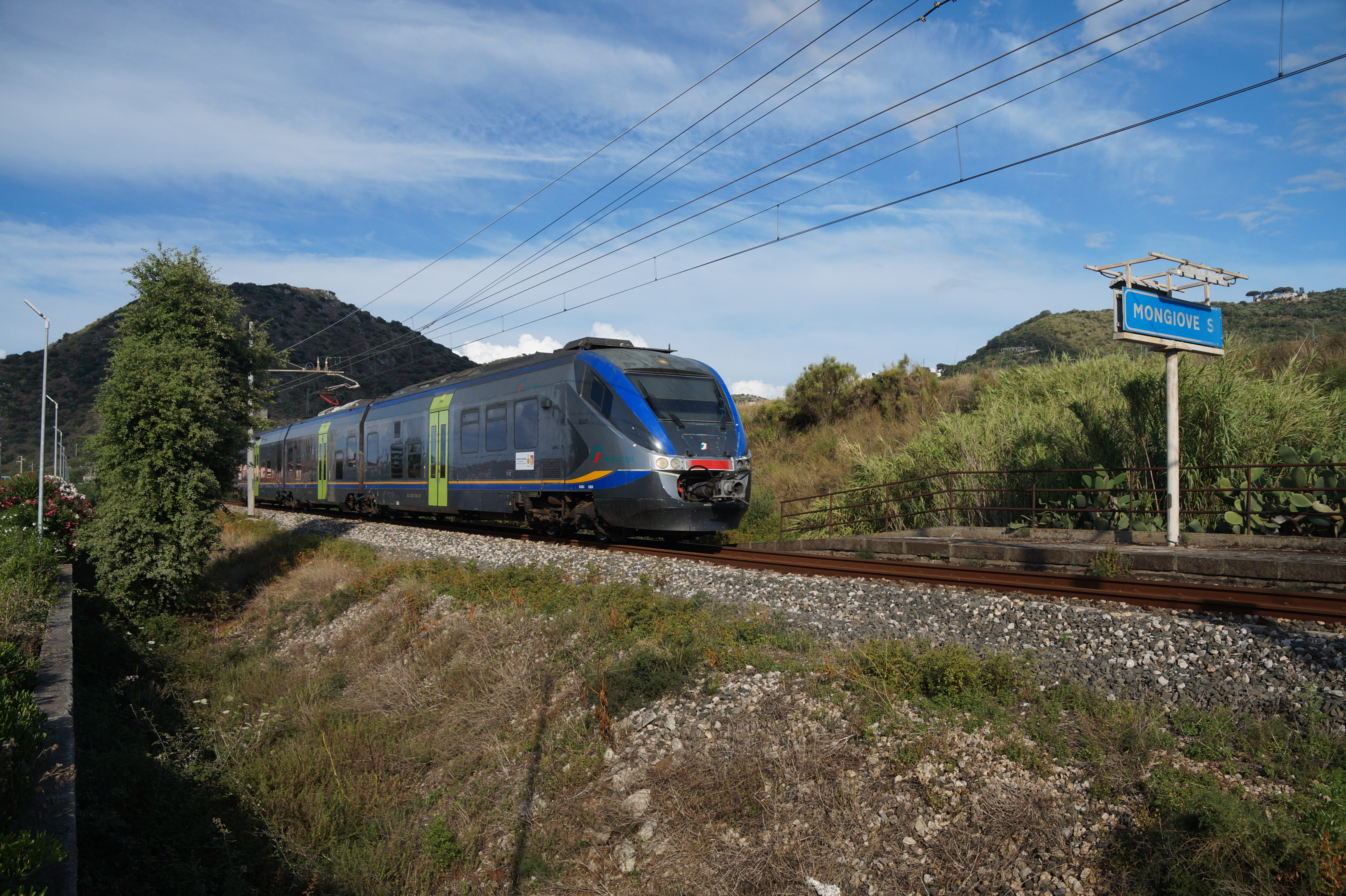 Dieseltriebzug ALe 501 029 bei Mongiove Siculo